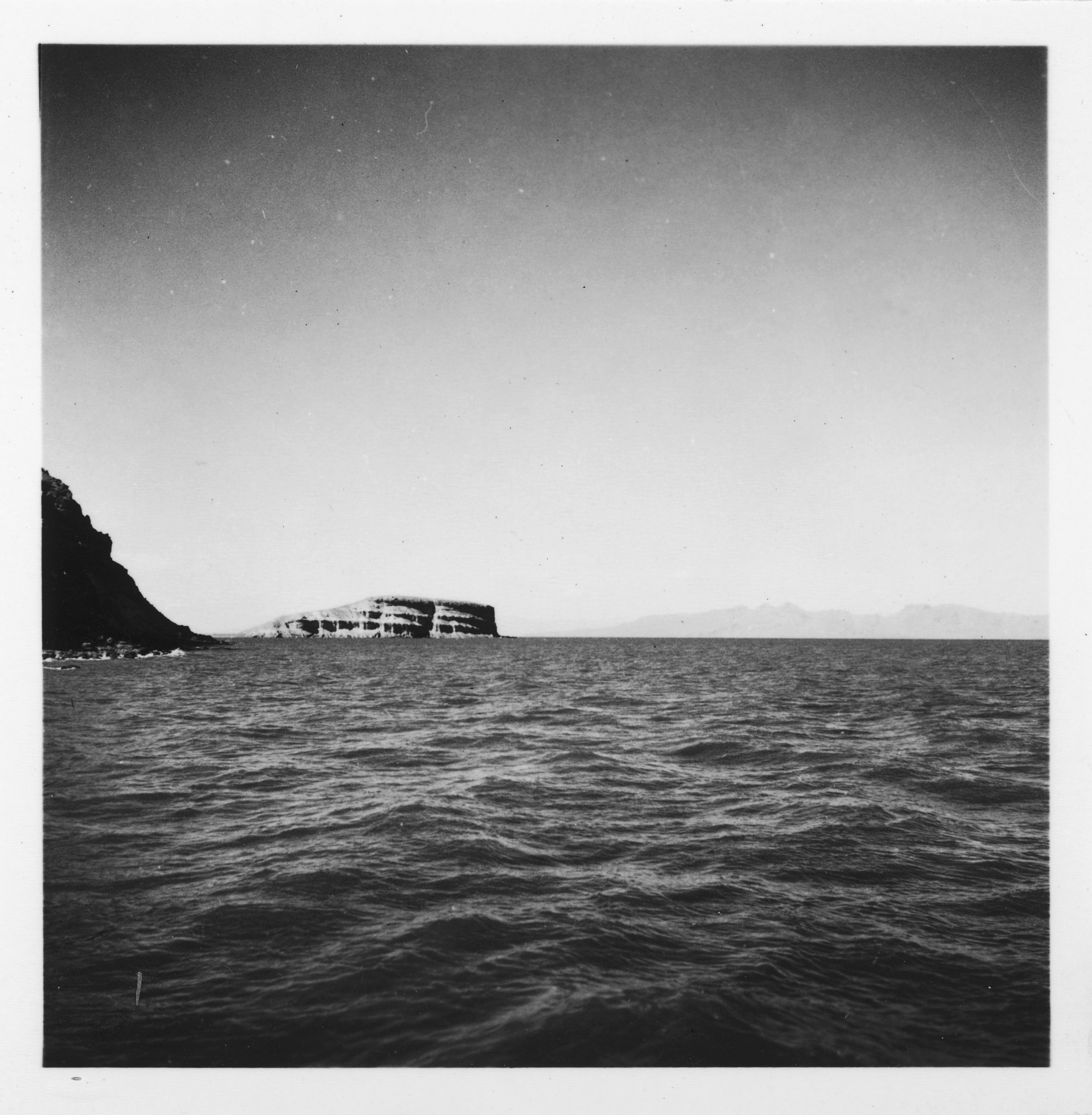 Persien, Urumiah (Urmia): See; Urmia-See